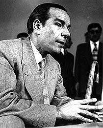 Iran's Foreign Minister Dr Hossein Fatemi